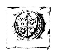 Sceau de René de Prie.